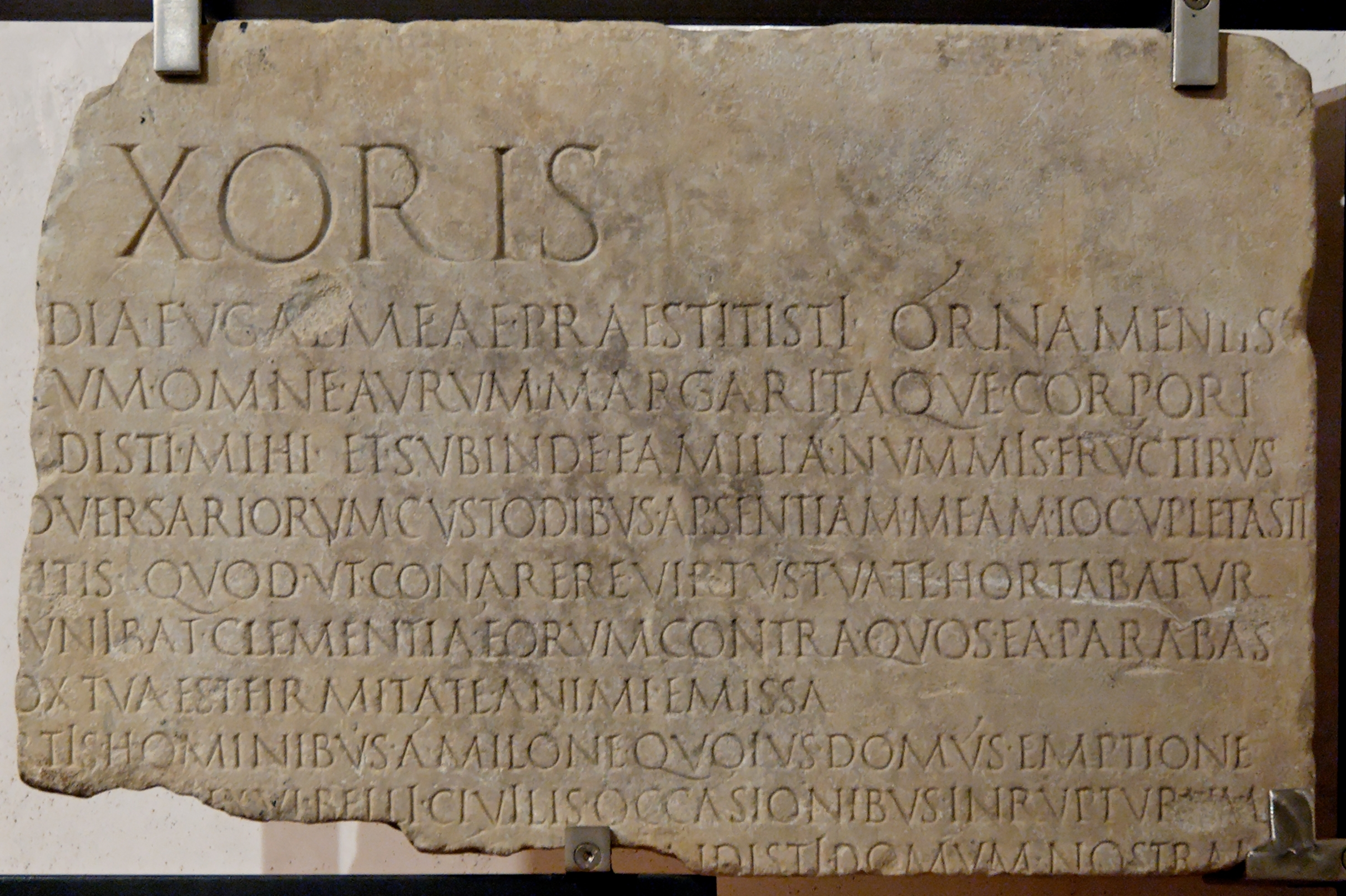 So-called “Laudatio Turiæ”, col.2 (2.2a to 2.11a). Latin inscription: “[varia et ampla subsi]dia fugae meae praestitisti ornamentis / [me instruxisti] cum omne aurum margaritaque corpori / [tuo accomodata trad]isti mihi et subinde familia nummis fructibus / [deceptis nostrorum a]dversariorum custodibus apsentiam meam locupletasti / [publicatis bonis repet]itis(?) quod ut conarere virtus tua te hortabatur / [mira pietas tua me m]unibat clementia eorum contra quos ea parabas / [nihilo minus tamen v]ox tua est firmitate animi emissa / [agmen conlectum ex repe]rtis hominibus a Milone quoius domus emptione / [potitus eram cum ille fuisset] exul belli civilis occasonibus inrupturum / [et direpturum … reiecist]i [et defe]ndisti domum nostram”. Marble, late 1st century BC. From the Via Portuense.